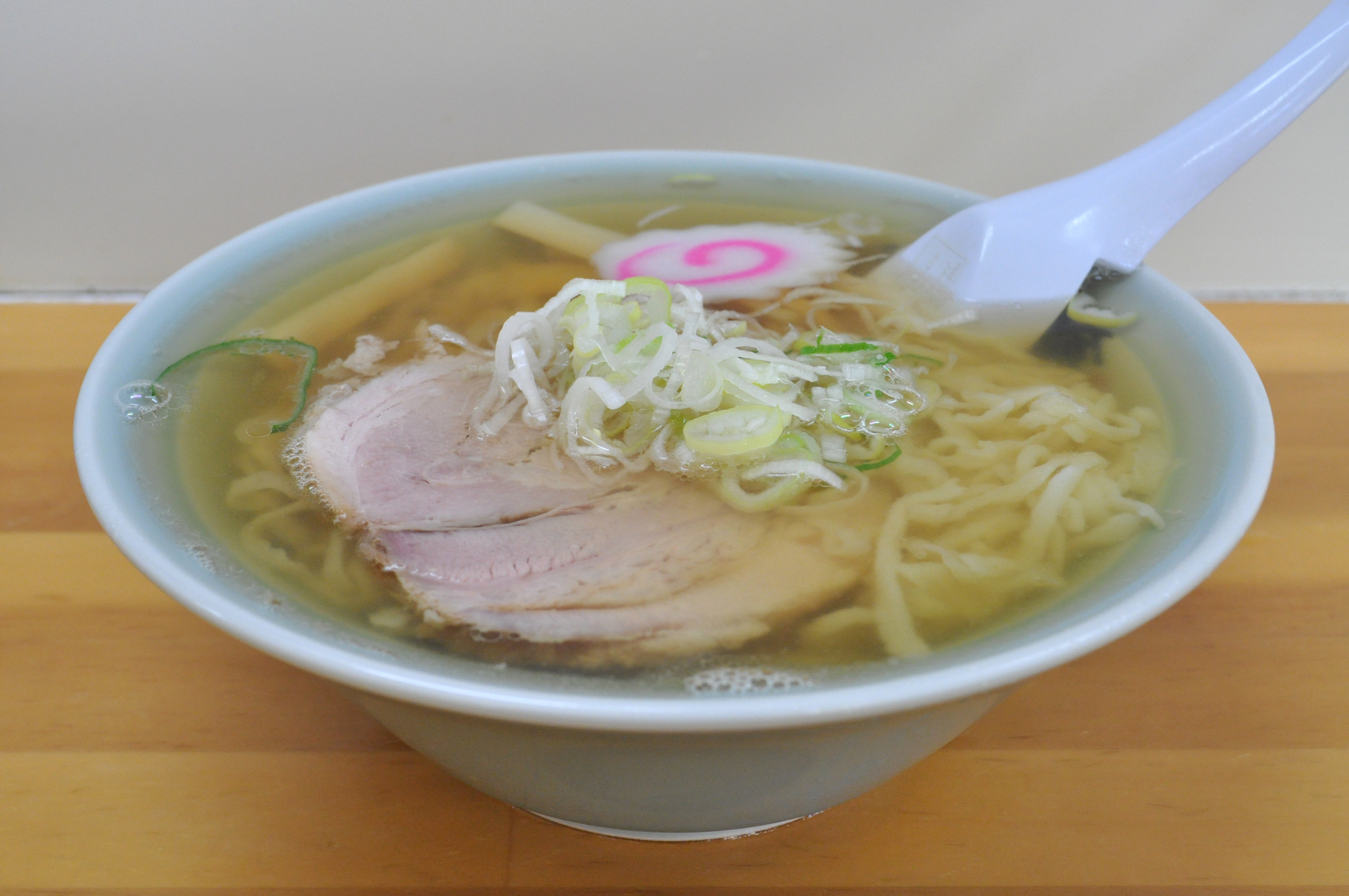 栃木県佐野市にあるらーめん大金の「ラーメン」